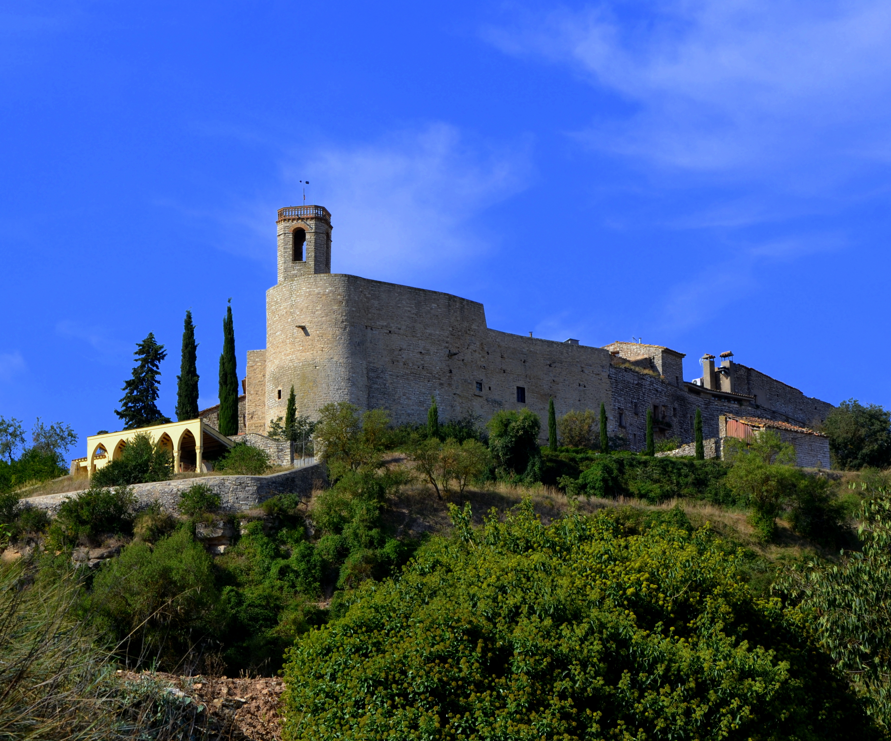 Recinte de Montfalcó Murallat (les Oluges)